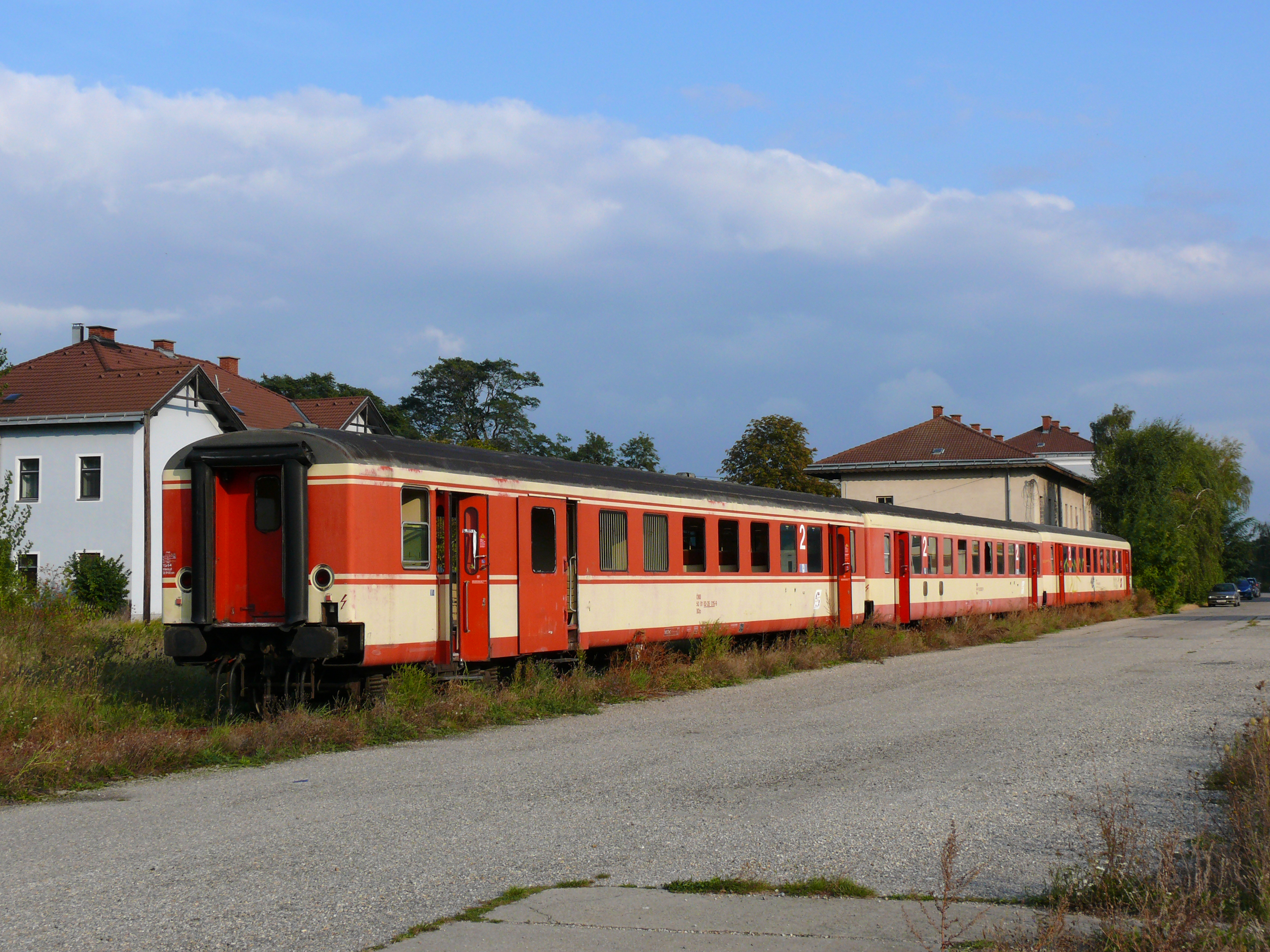 Eine Schlierenwagen-Garnitur mit einem BDpz und zwei Sparlack-Schlieren Bp am Bahnhof Marchegg.